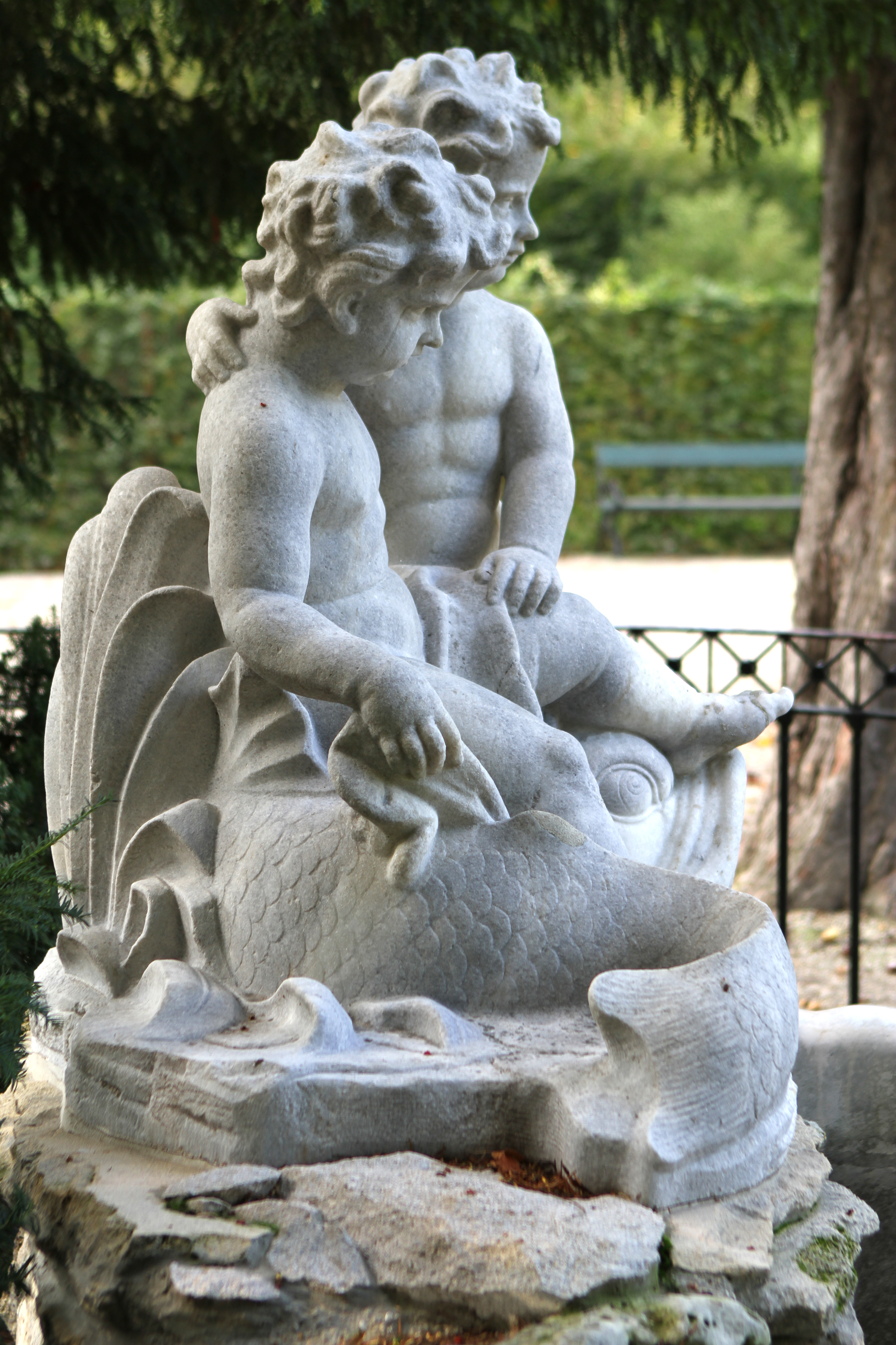 Engelsbrunnen in Schönbrunn, Wien.